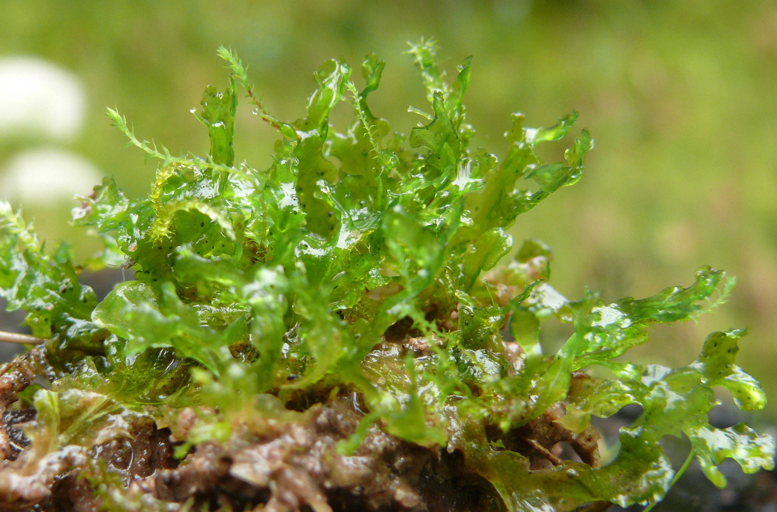 Blasia_pusilla, Schwäbisch-Fränkischer Wald, Deutschland